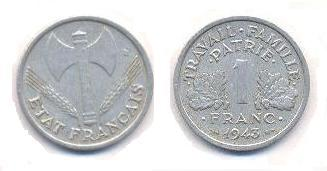 Moneta della Francia del 1943 - Regime di Vichy